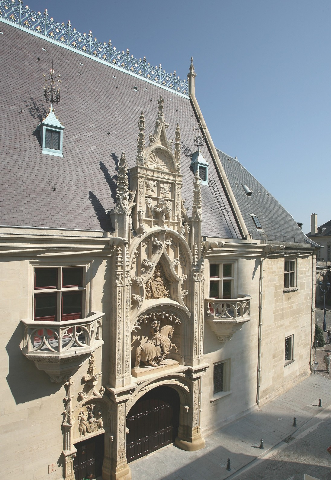 Porterie du Palais ducal de Nancy (XVIe siècle)